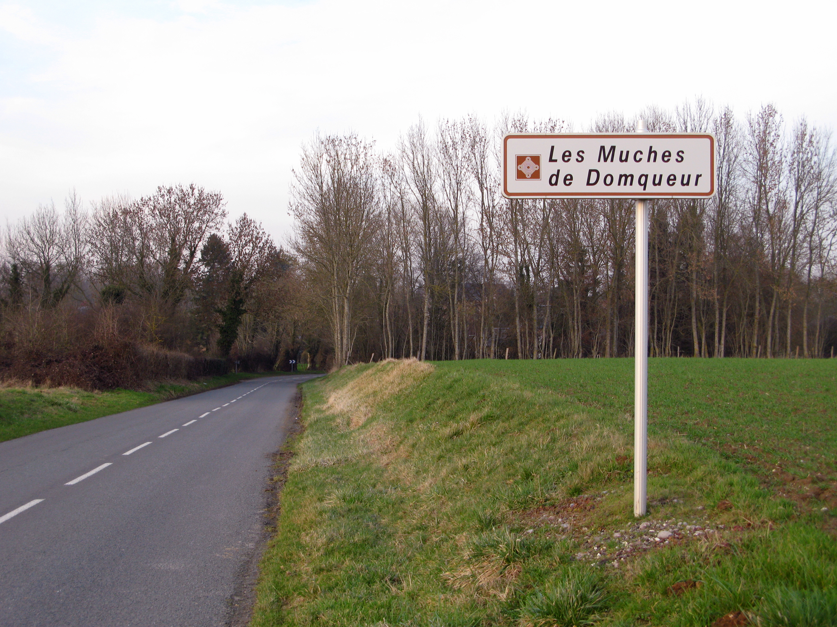 Domqueur (Somme, France). Panneau juste avant l'entrée dans le village, en venant de Gorenflos.